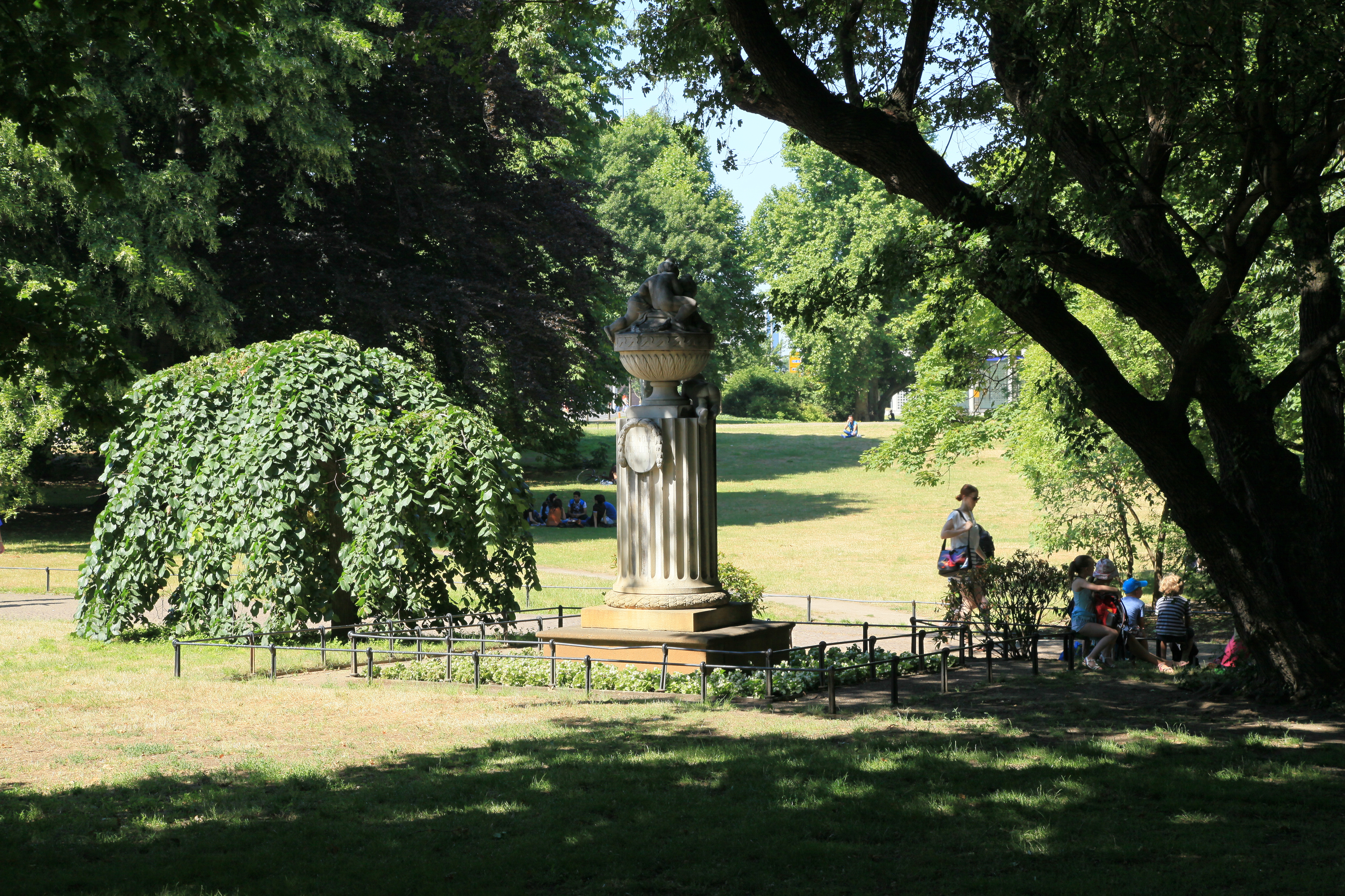 Gellert-Denkmal in der Lennéanlage, Schillerstraße in Leipzig